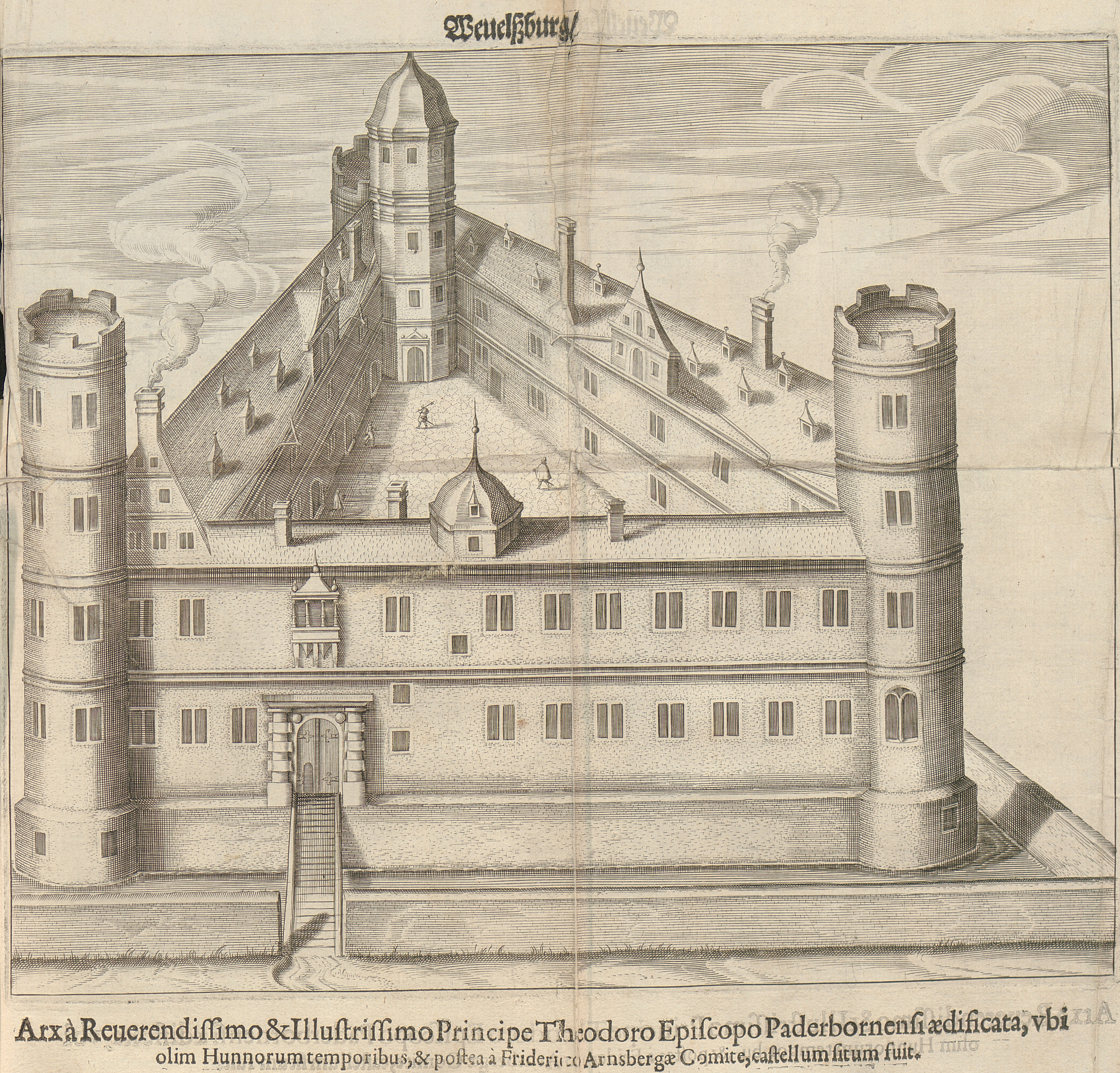 Wewelsburg